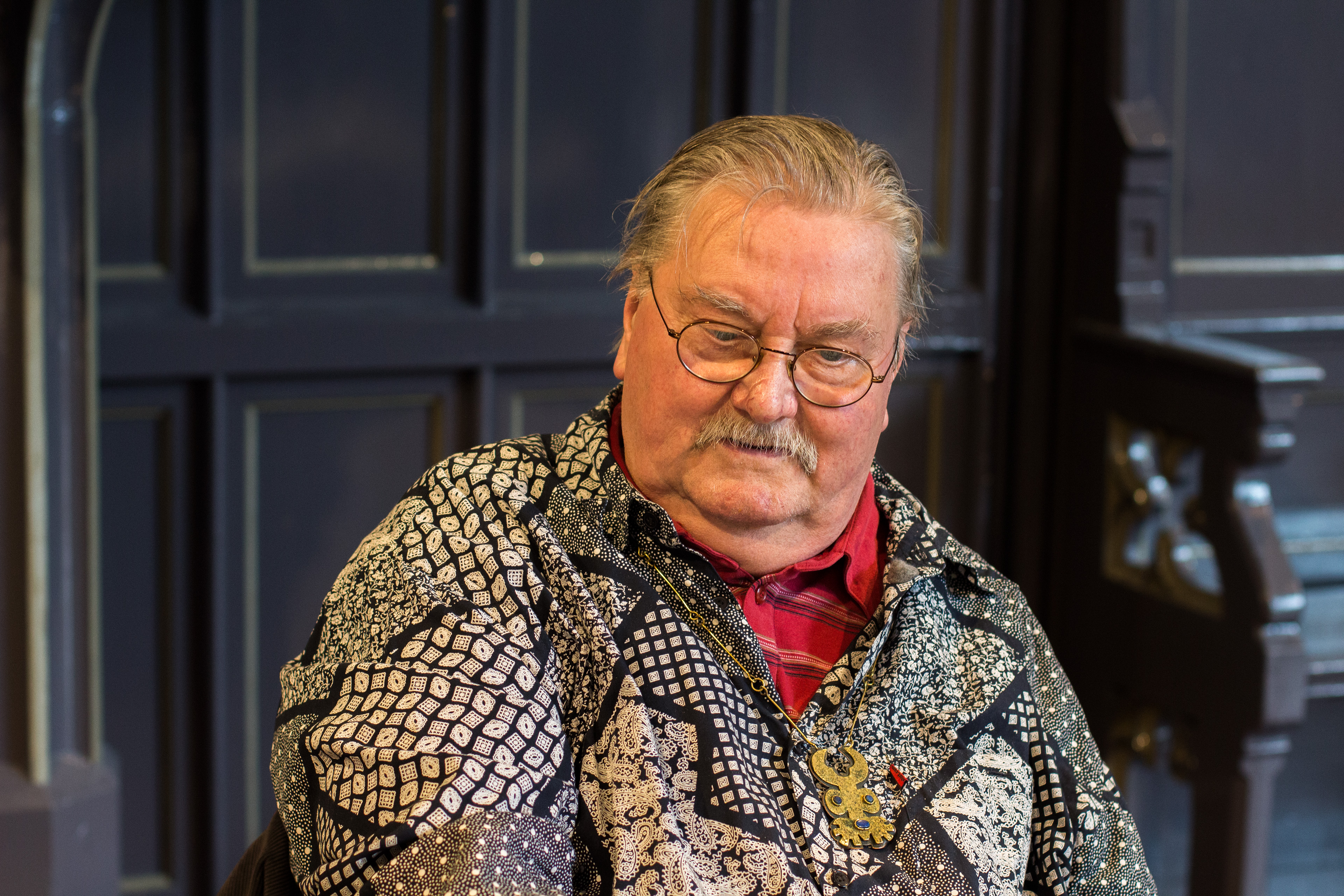 Al Imfeld an Vernissage Februar 2015 Zürich